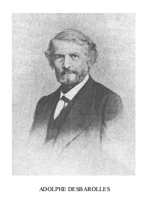 Adolphe Desbarolles Source